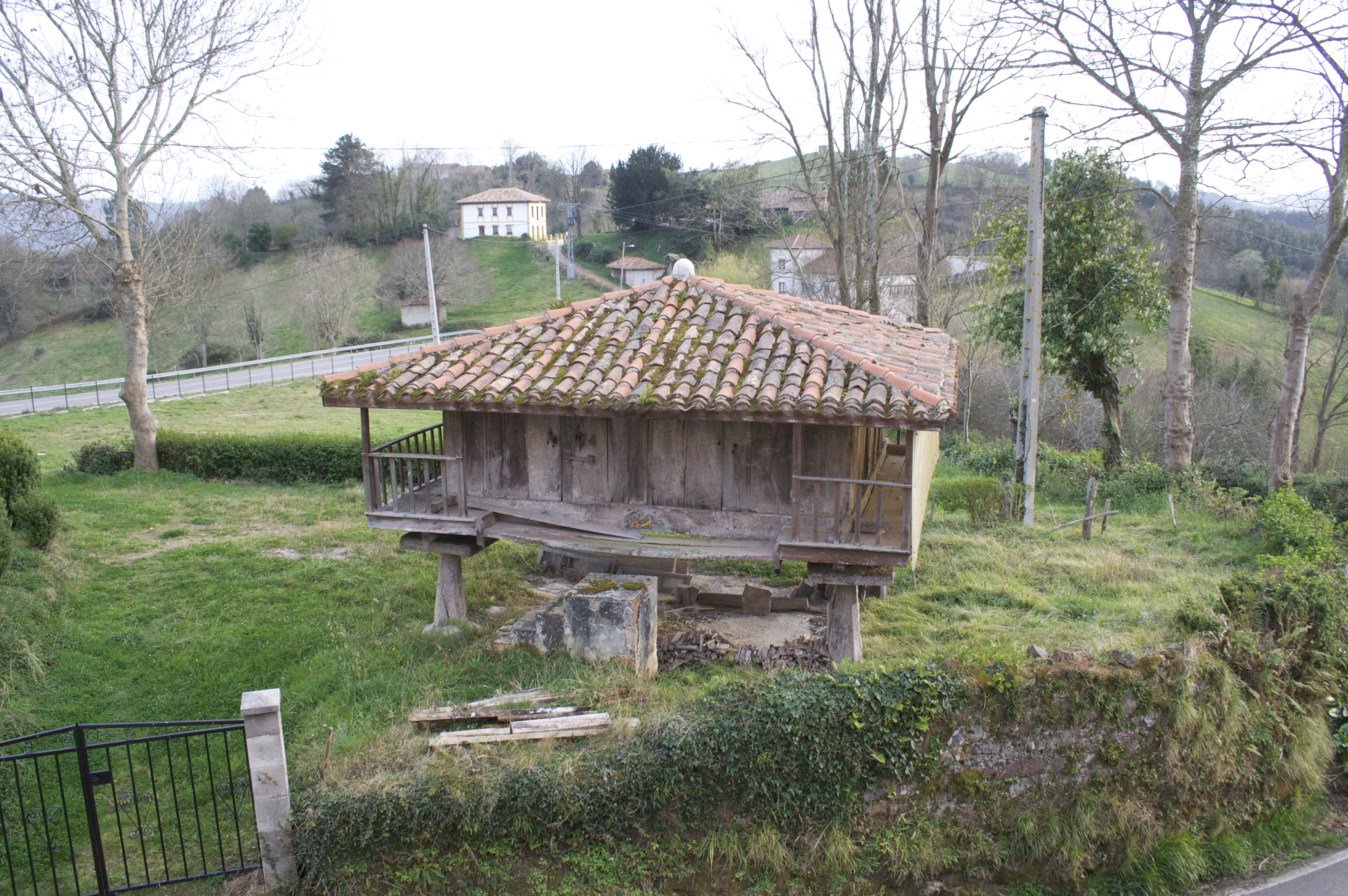 Hórreo en Sietes, concejo de Villaviciosa en Asturias (España).